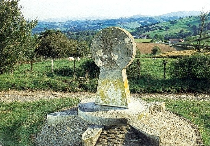 La photo papier doit dater de 95/96, le scan date de septembre 2000